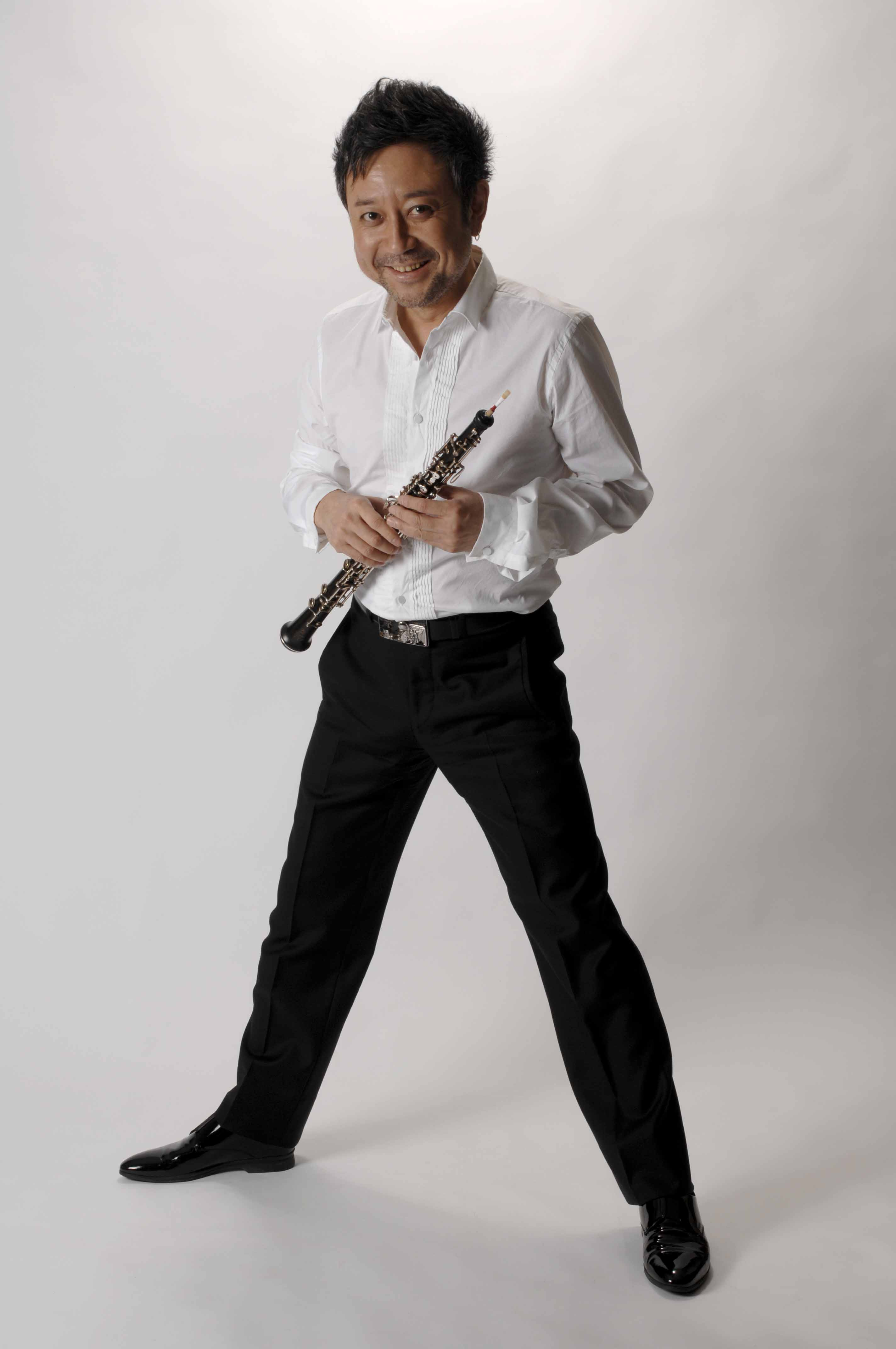 市原満写真